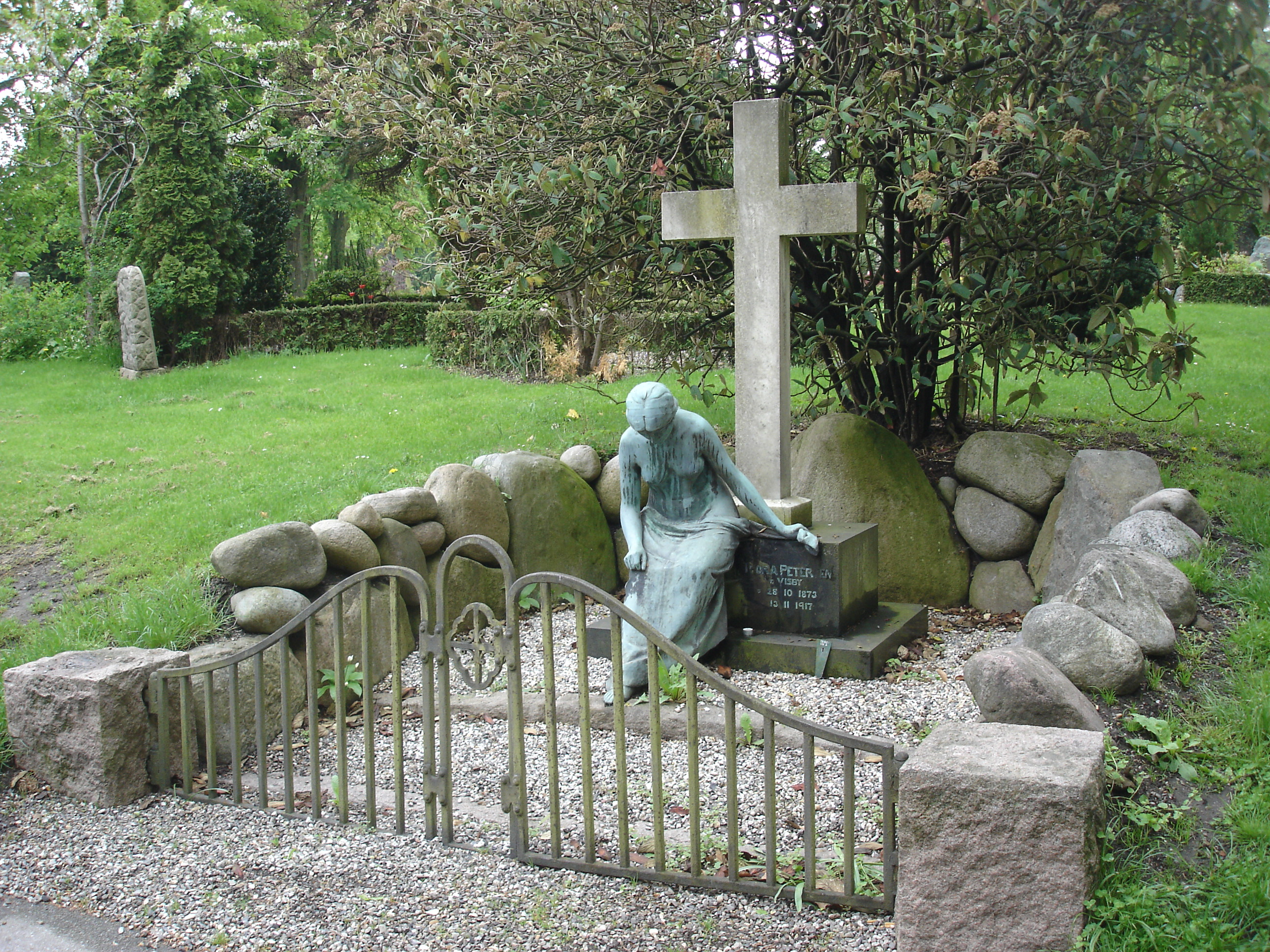 Thora Petersens gravsted på litra F på Nordre Kirkegård i Aarhus med kvindeskulptur, udført af Elias Ølsgaard